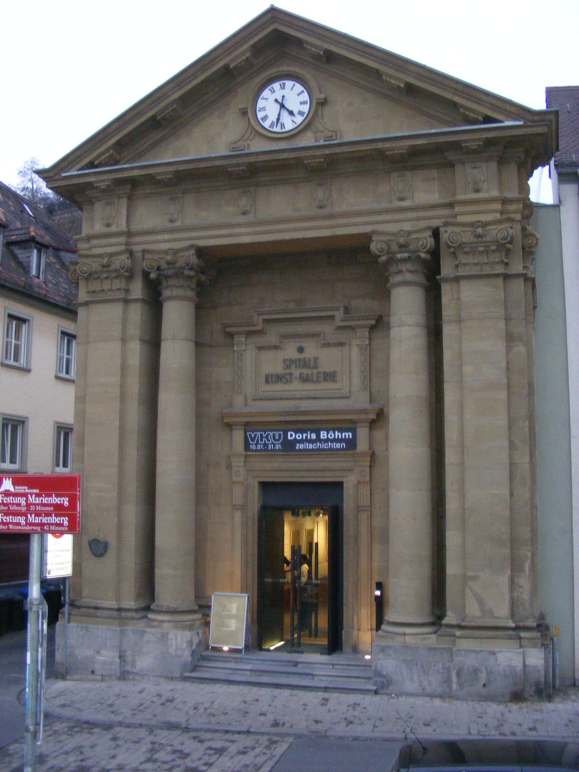 Spitäle - Außenansicht Front. Zeller Straße 1, 97080 Würzburg